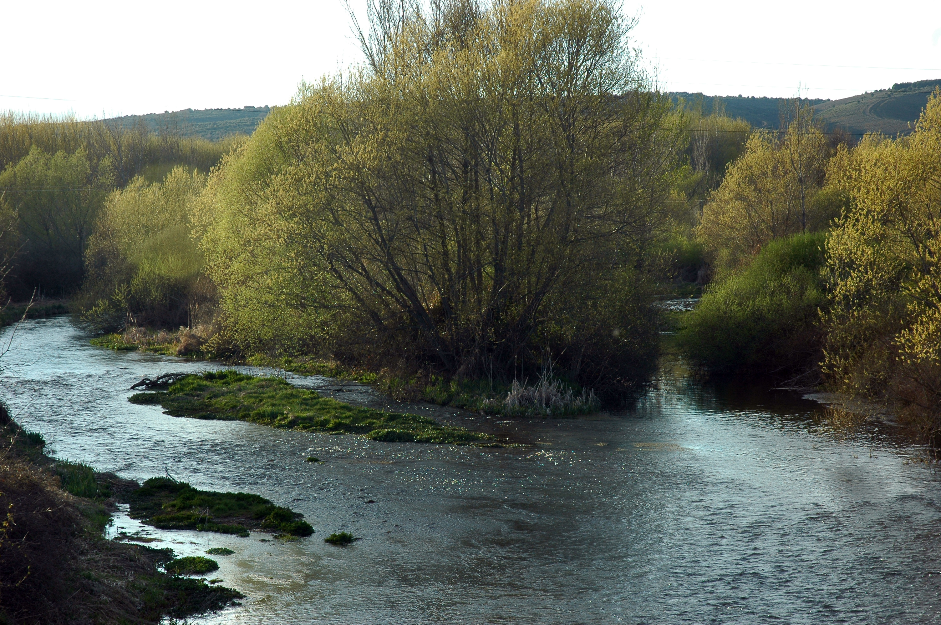 La formacion del río Órbigo por unión del río Luna y del río Omana en Santiago del Molinillo, León, España